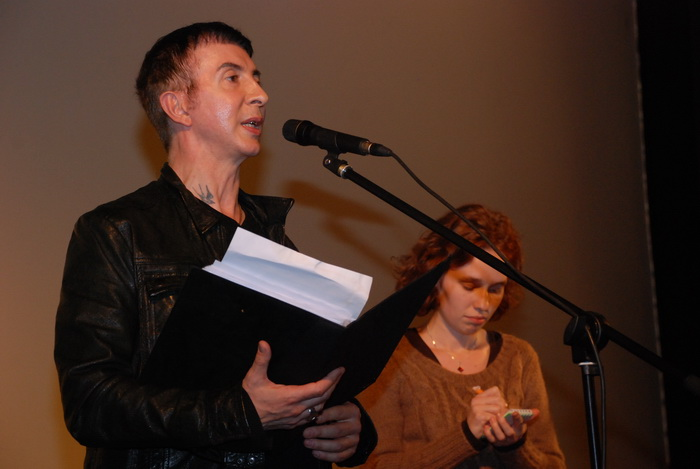 Марк Алмонд на кинофестивале "Бок о бок"